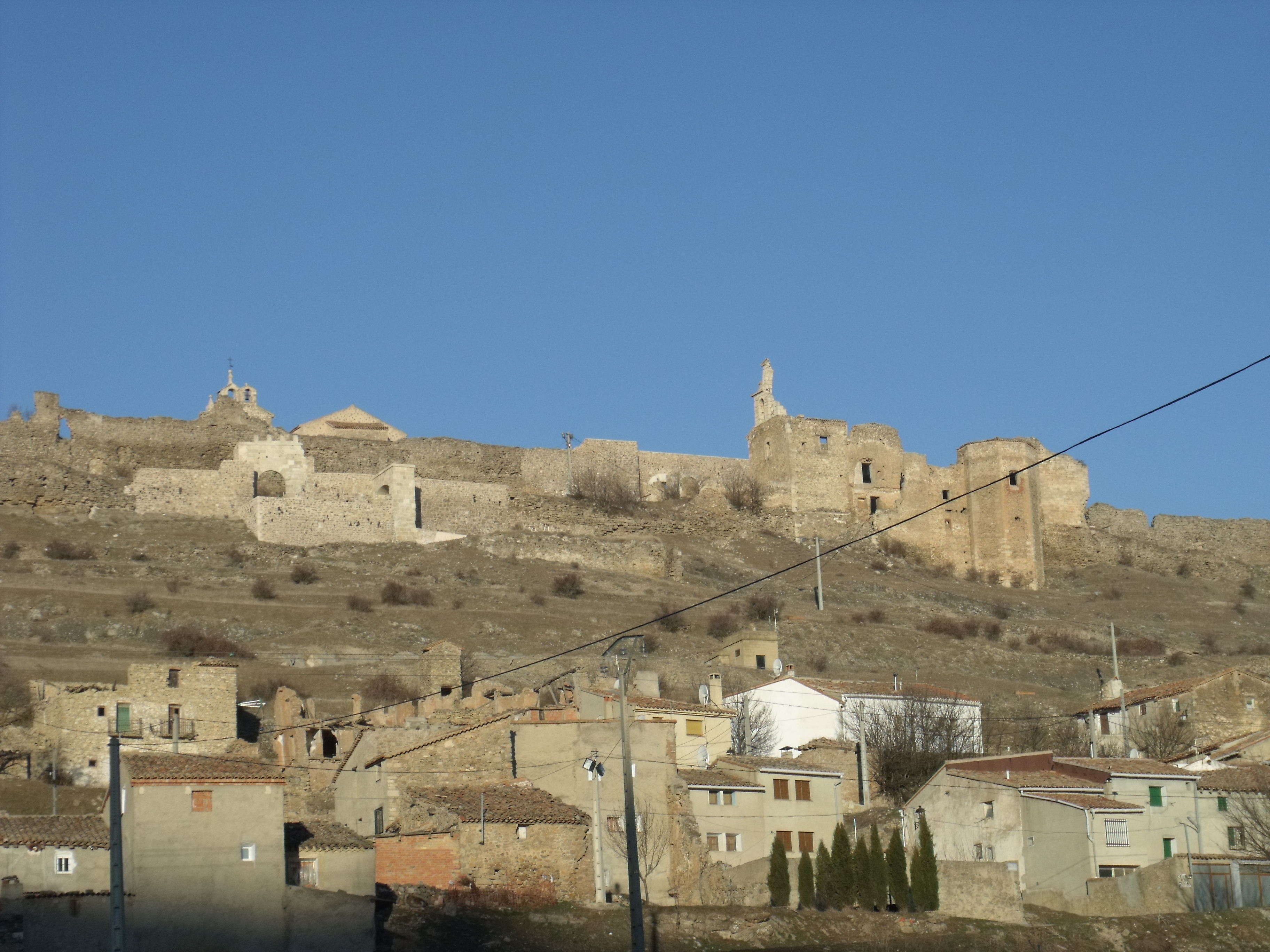 Moya (Cuenca, España). La Villa desde el Arrabal.